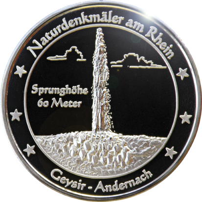 Rheintaler Kaltwassergeysir Namedy